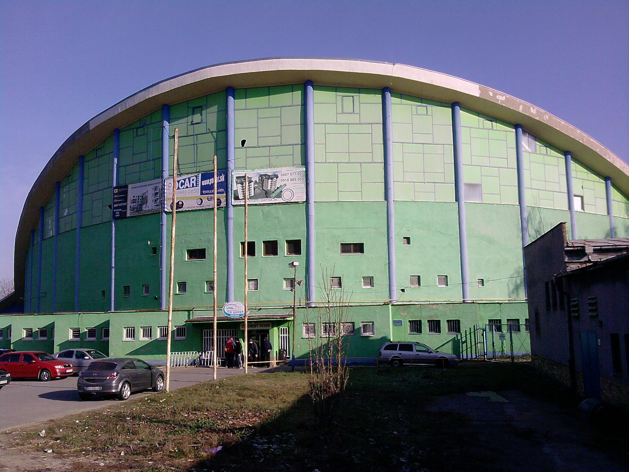 ICE Aréna v Prešove